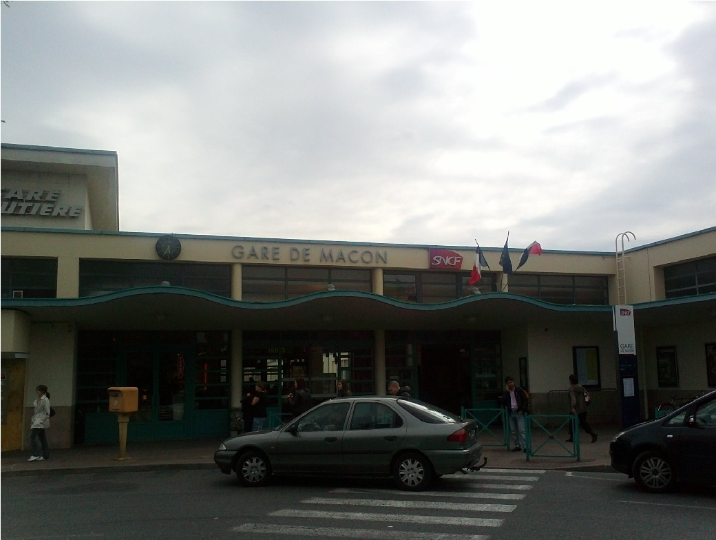 法国马孔城站（马孔站）